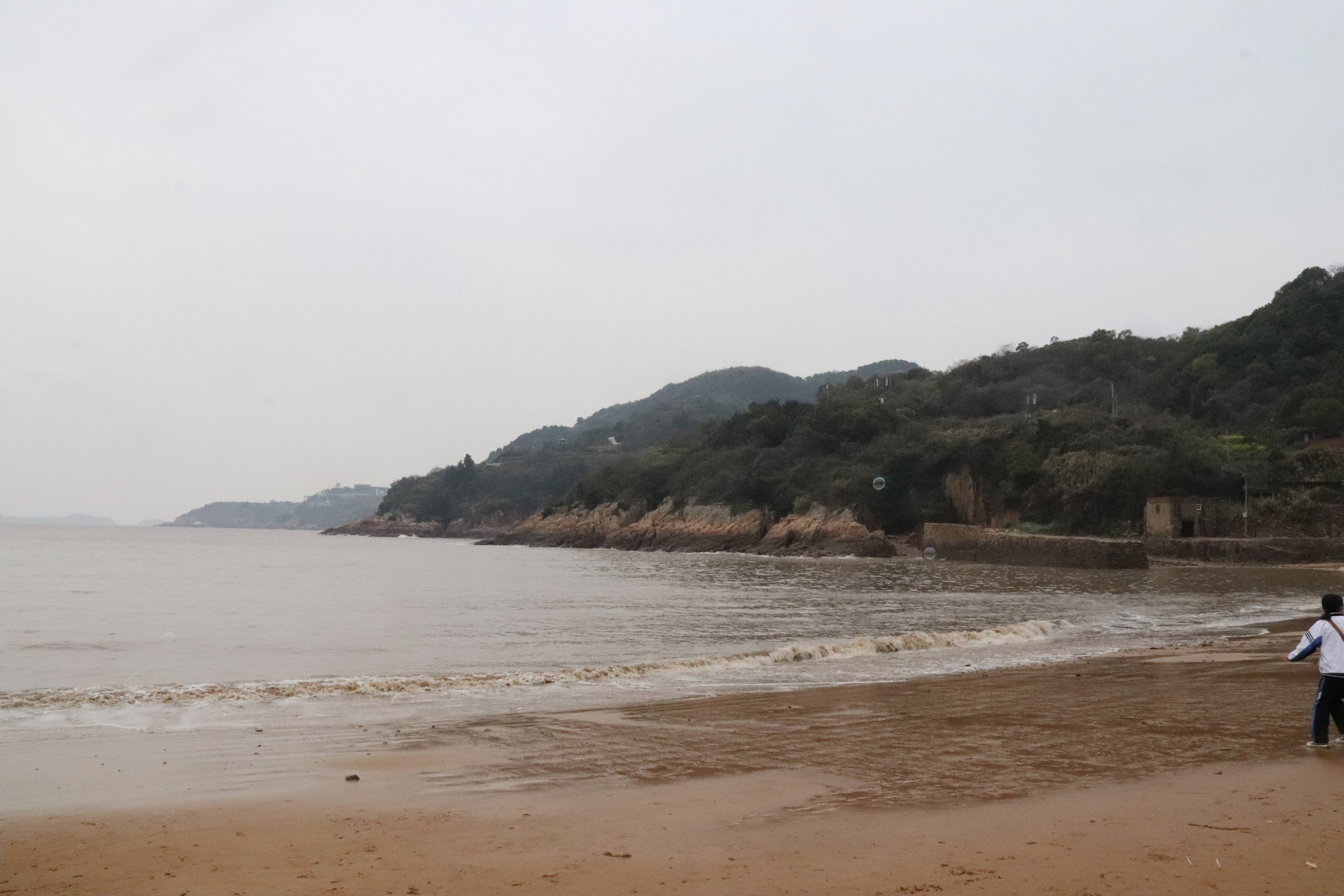 中文（中国大陆）: 浙江省玉环市干江白马岙景区